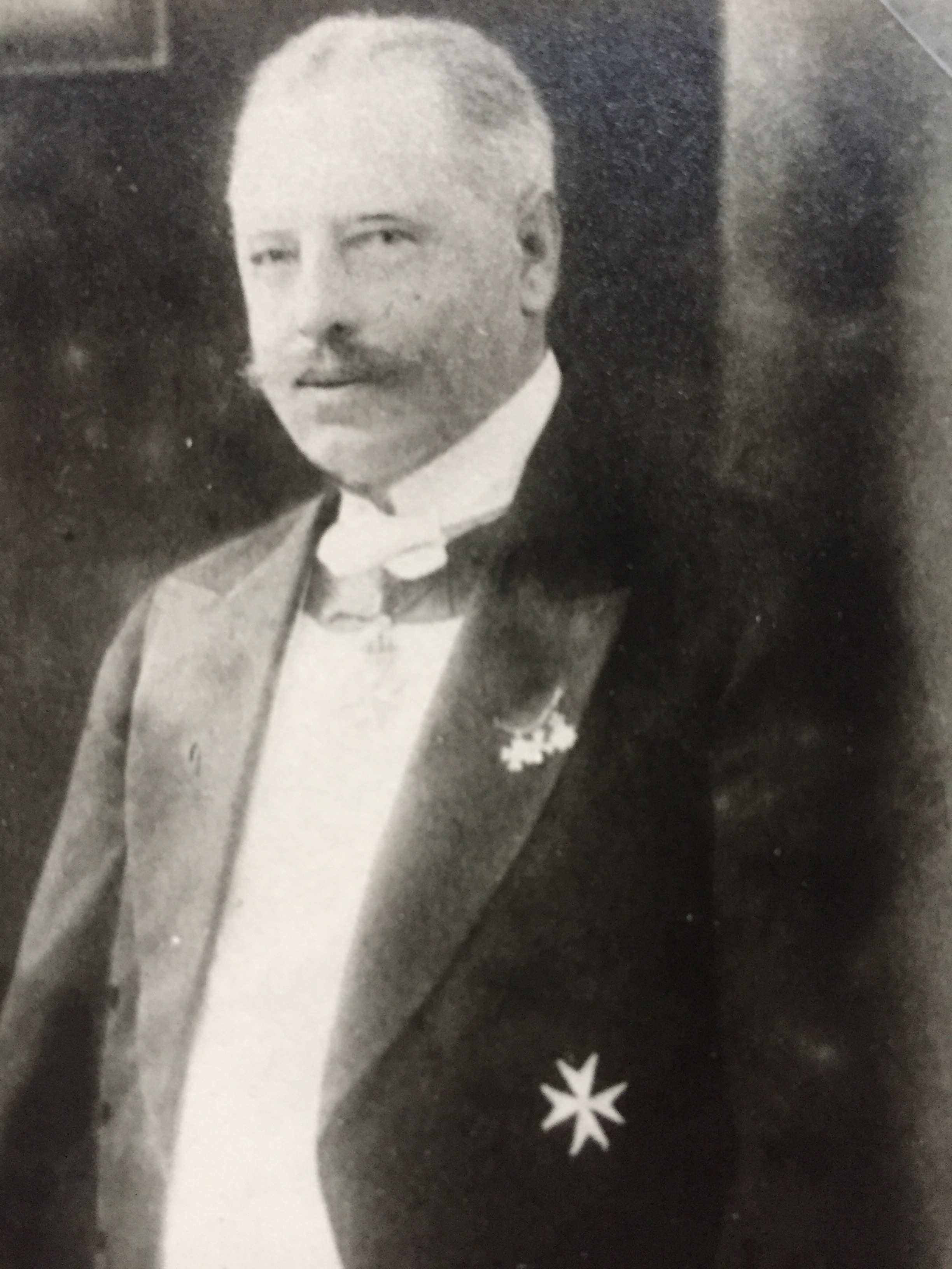 Heinrich von Heydebrand und der Lasa; Politiker und Gutsbesitzer; Fotoaufnahme ca. 1922